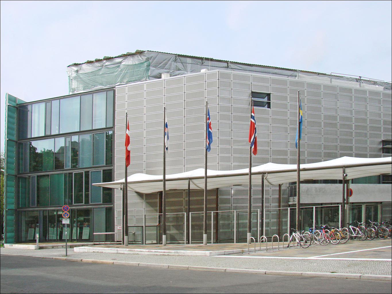 La façade d'entrée du complexe des Ambassades Cinq pays scandinaves : Danemark, Suède, Finlande, Islande, Norvège, ont décidé de regrouper leurs Ambassades à Berlin au sein d'un complexe architectural commun ouvert en 1999. Plusieurs architectes ont collaboré à la conception et à la réalisation des bâtiments. Le concept général a été élaboré par le bureau austro-finlandais Berger § Parkinnen. Une barrière en lamelles de cuivre entoure les édifices. Berlin en ligne site MIMOA